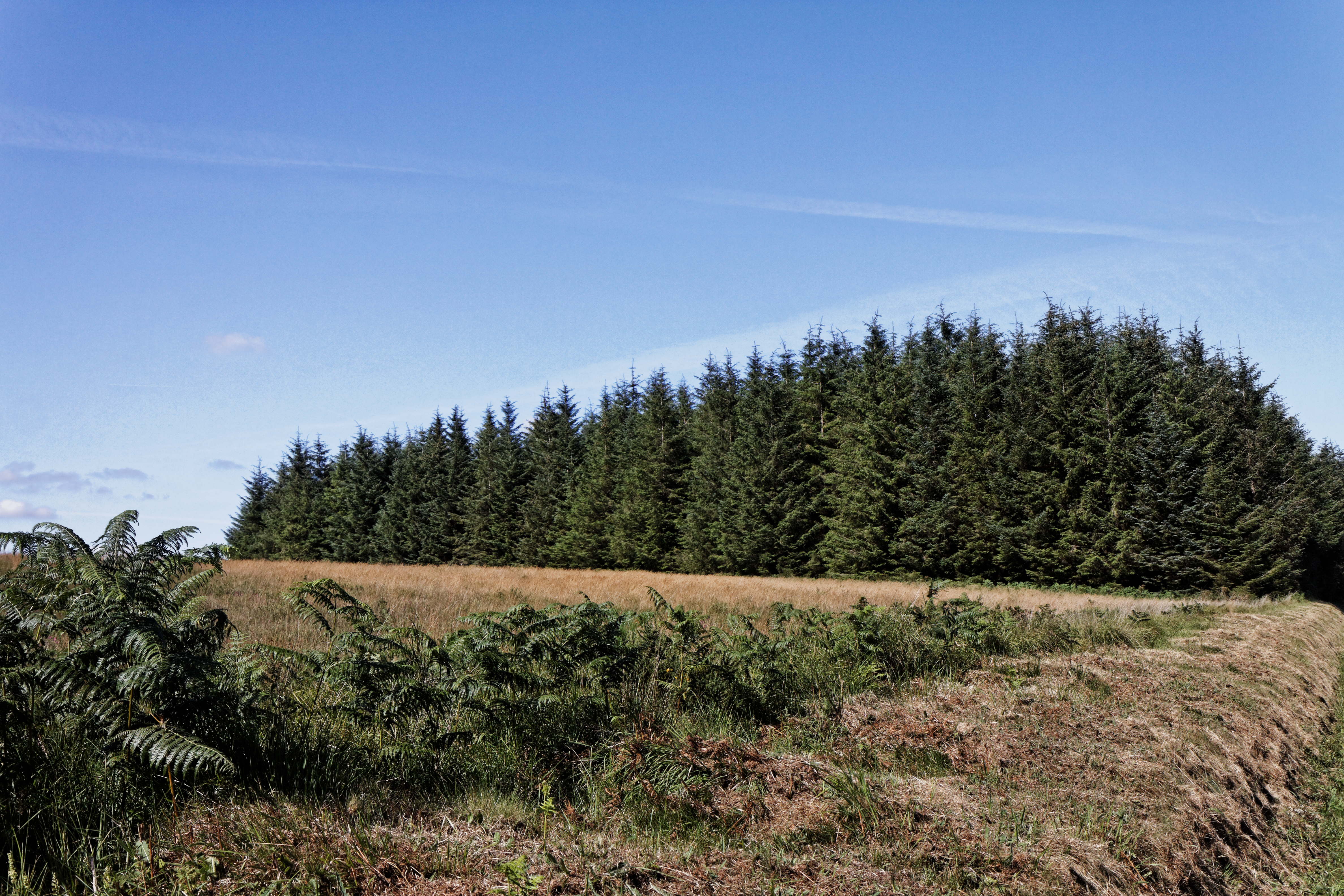 Randonnée en pays de Morlaix, "la balade de l'abbaye" d'une longueur de 12 km se parcoure en environ trois heures sans grosse difficulté technique.